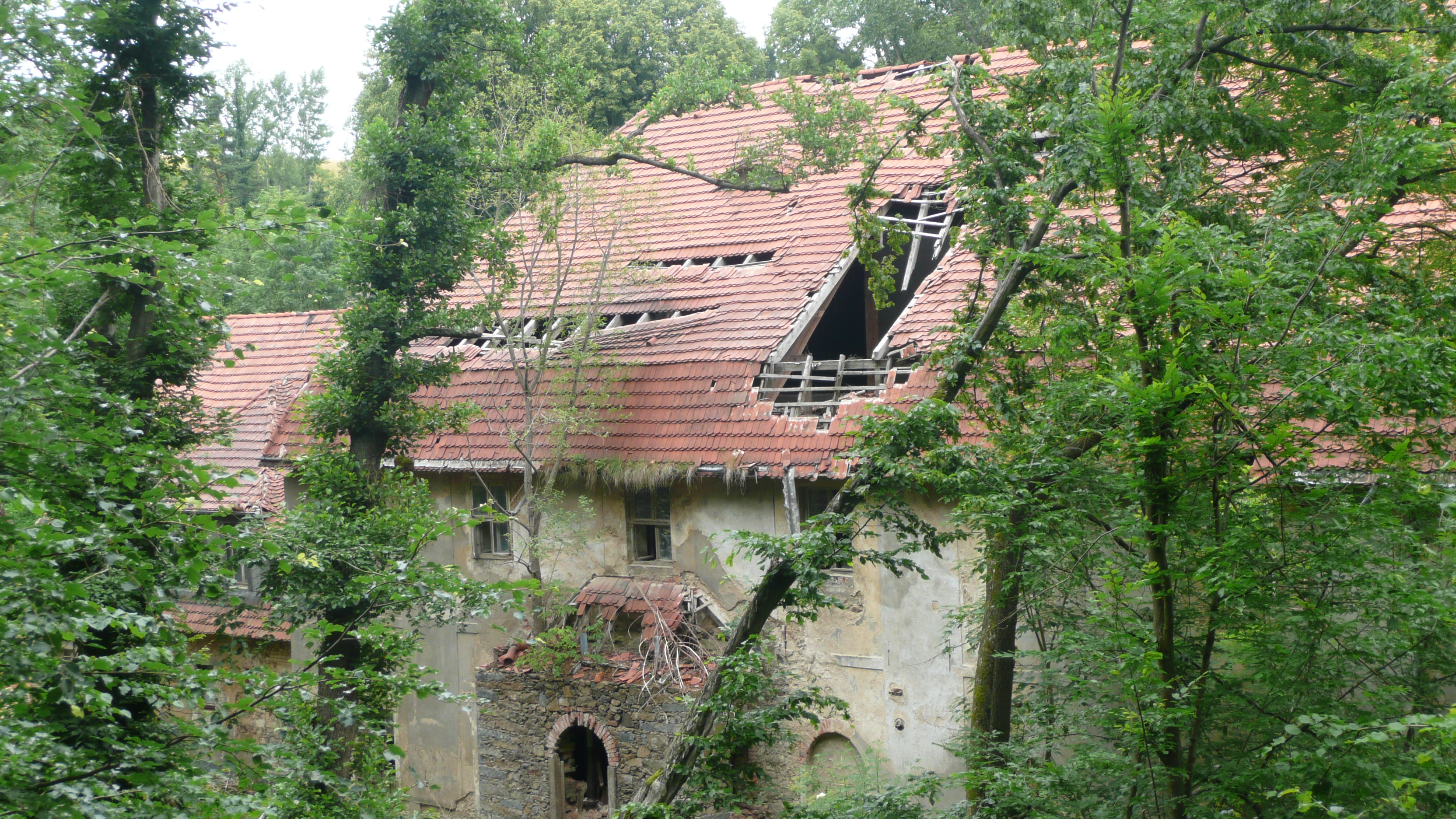 Tornado im Seifersdorfer Tal am 24.5.2010 - Ansicht vom 18.6.2011 nach den Aufräumarbeiten